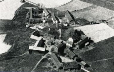 Skjelstadgårdene i daværende Hegra kommune i Stjørdal. Reprofoto av flyfoto fra rundt 1950.